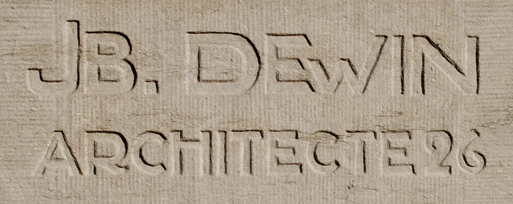 Belgique - Bruxelles - Institut médico-chirurgical de la Croix-Rouge (place Brugmann) - Monument à Antoine Depage (Godefroid Devreese, 1926)